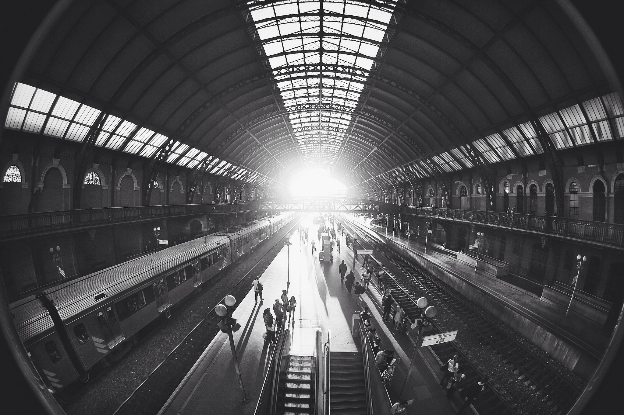 Estação da Luz